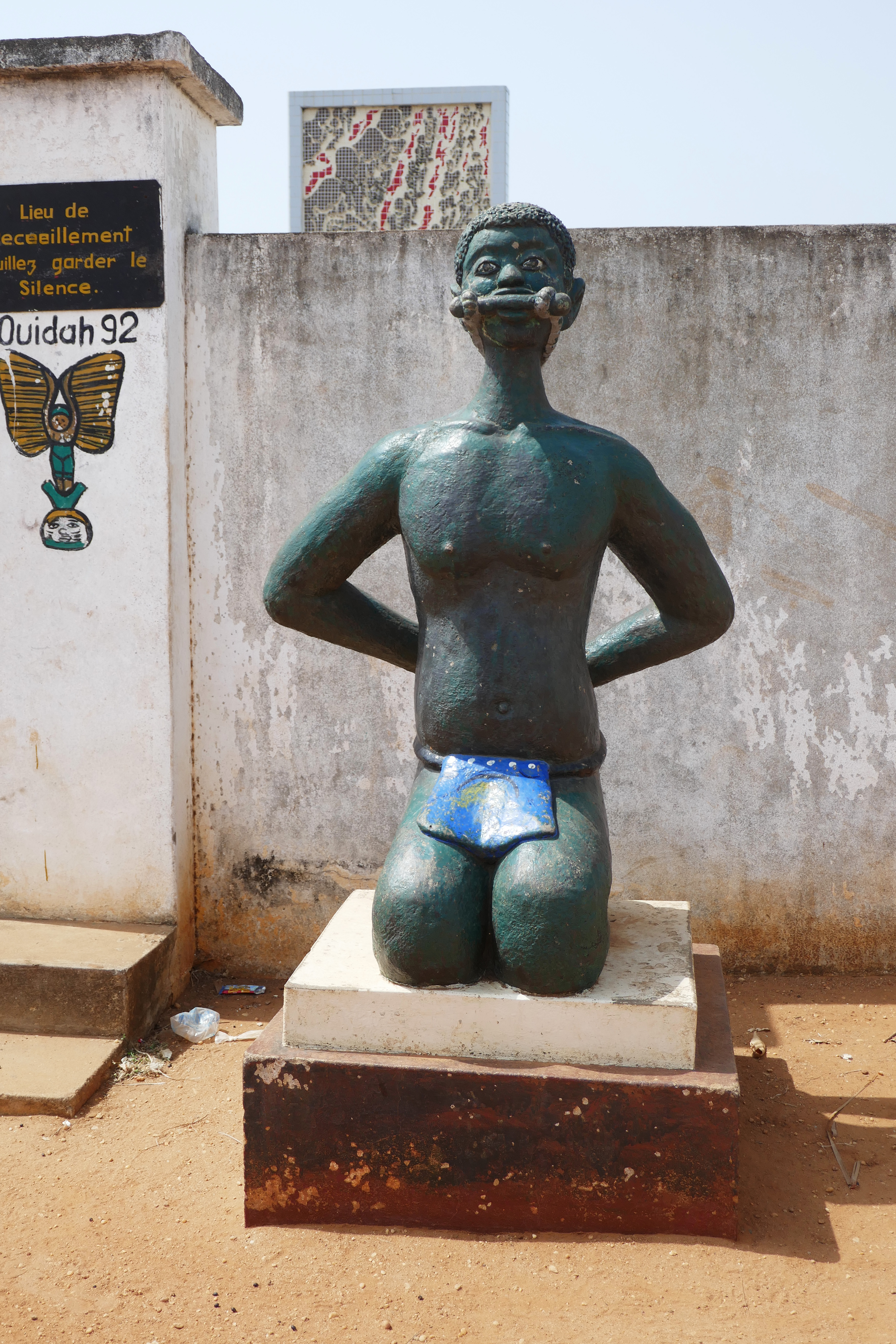 Mémorial de l'esclavage à Zoungbodji, près de Ouidah (département de l'Atlantique, Bénin).